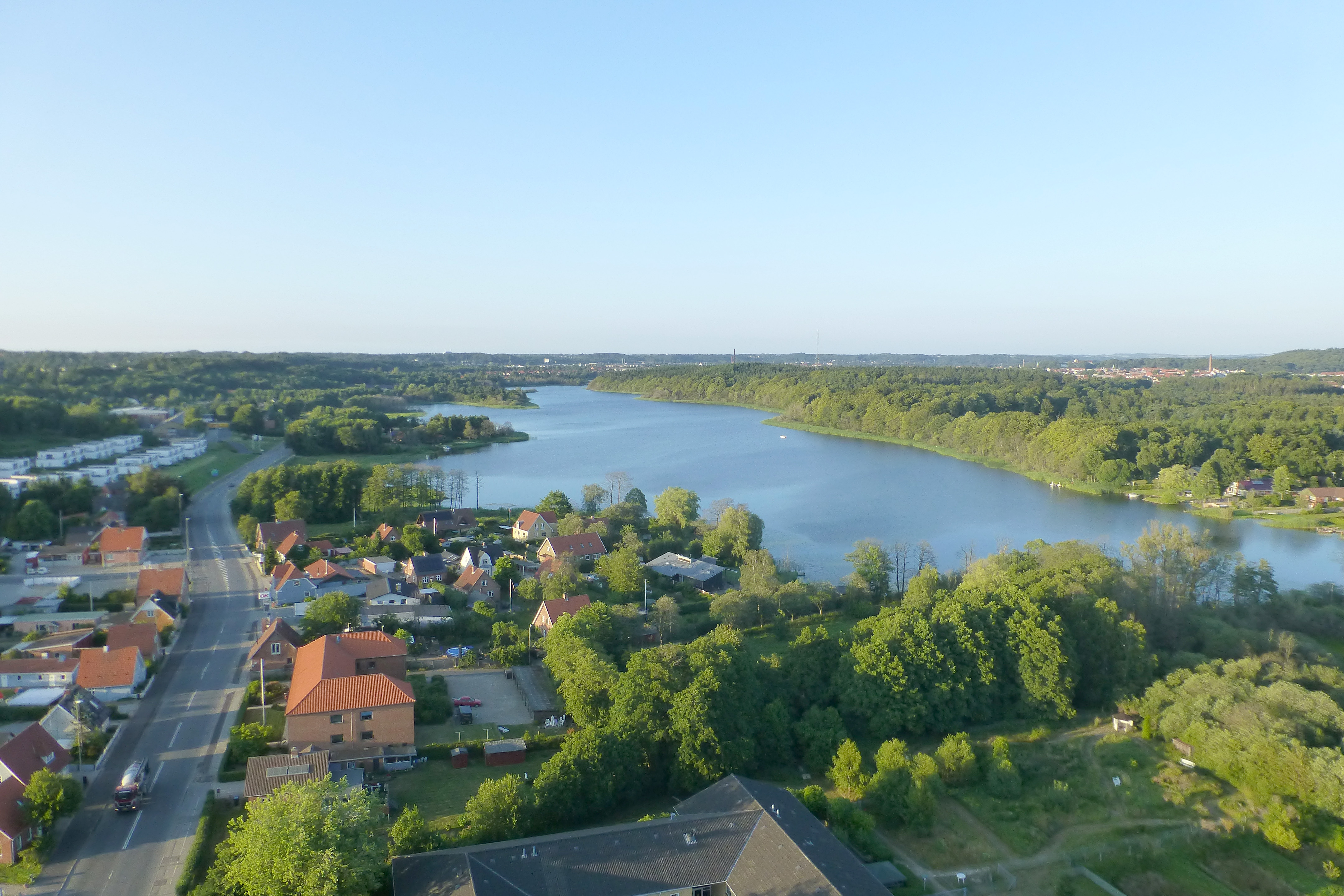 Lysbro og Silkeborg Langsø set mod øst